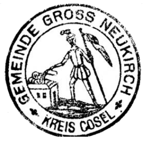 Altes Siegel bzw. alter Stempel (von 1927) der Gemeinde Groß Neukirch im Landkreis Cosel, Schlesien.